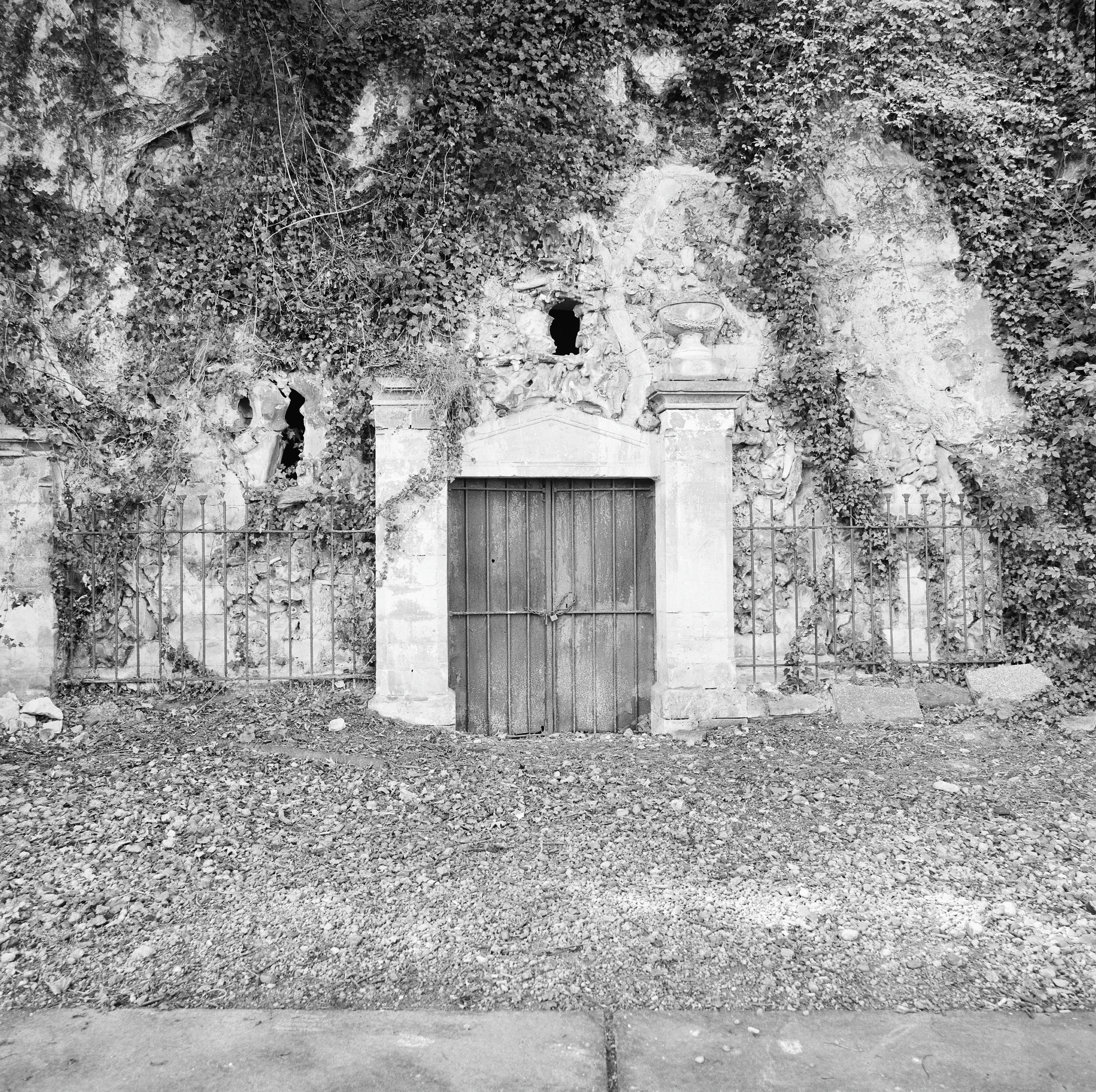 Nederlands Hervormde Kerk: Exterieur INGANG GRAFKELDER ACHTER DE KERK